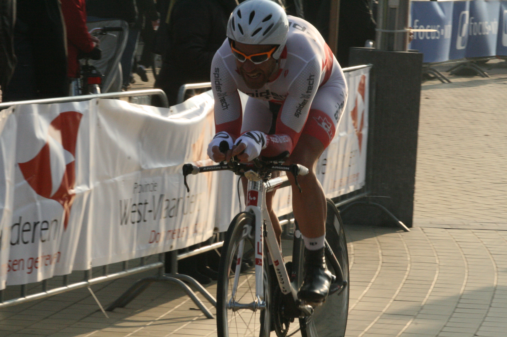 Driedaagse van West-Vlaanderen 2011, proloog in Middelkerke